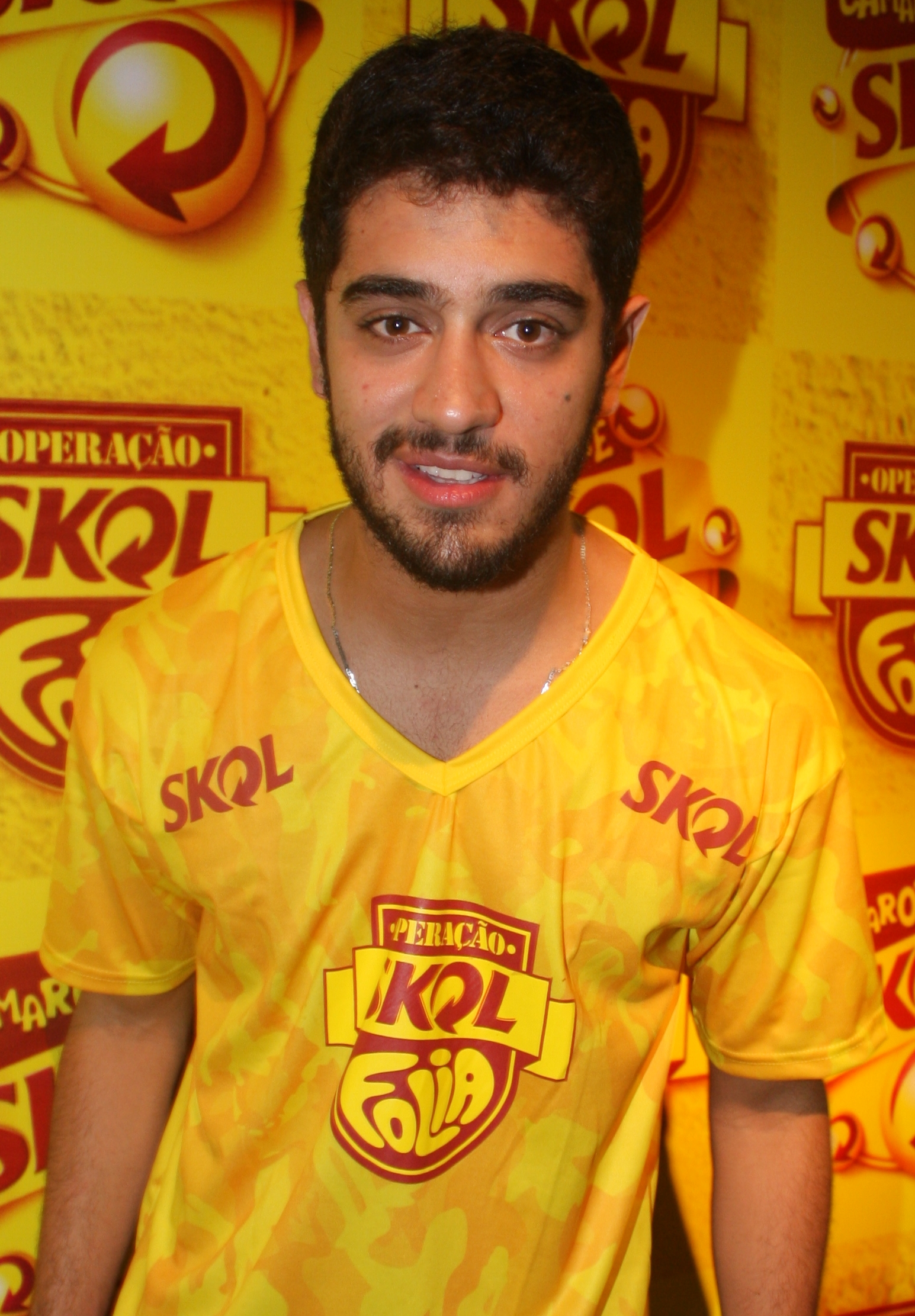 Miguel Rômulo no carnaval de 2013.